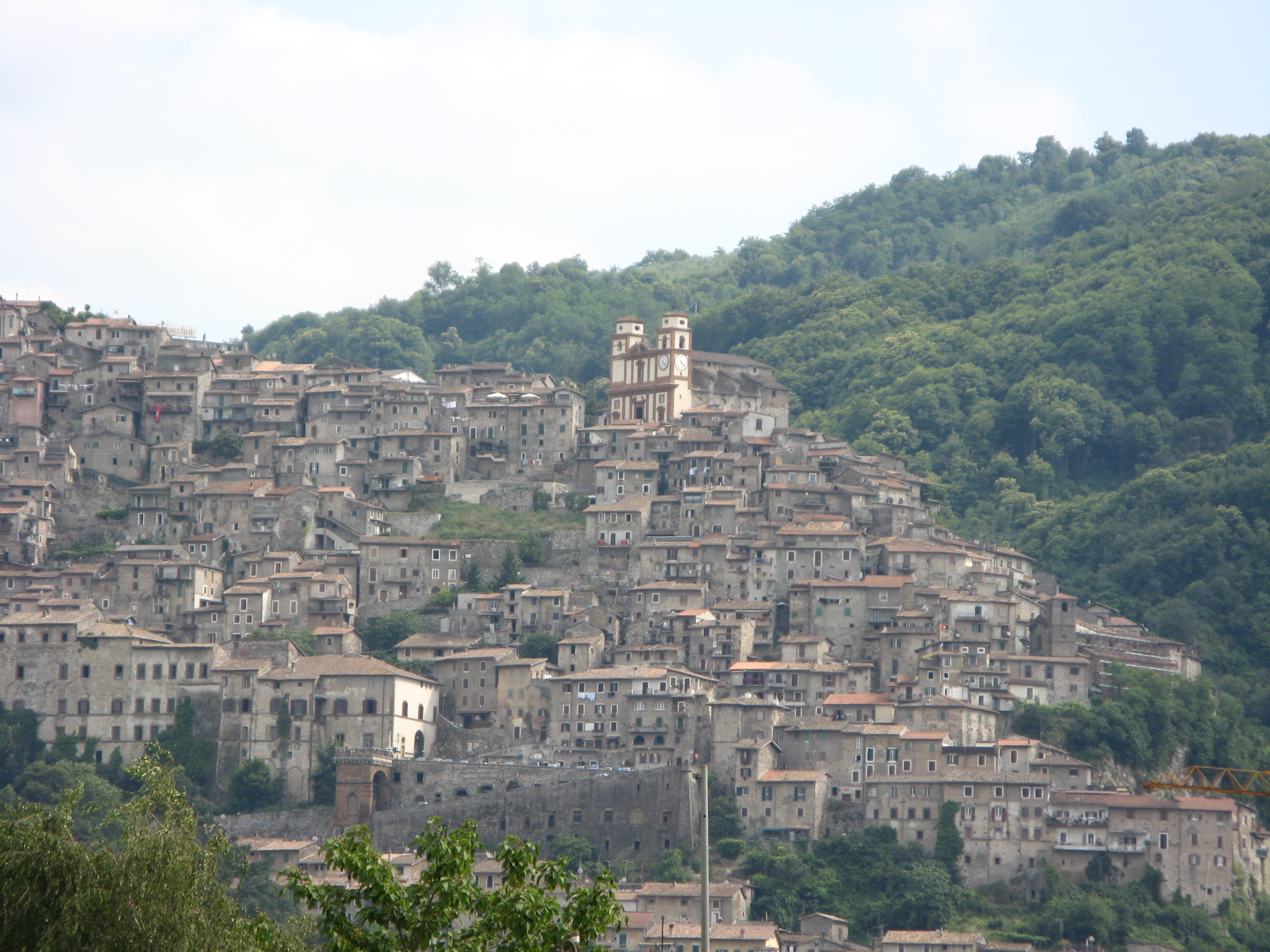 Artena, Panorama